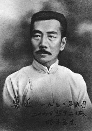 来自网络鲁迅纪念馆